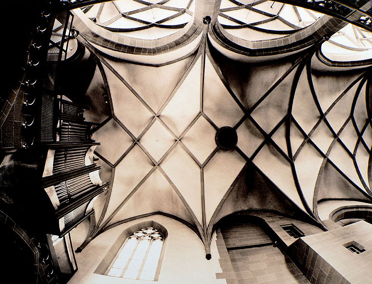 Die große Vleugelsorgel an St.Johannes in Kitzingen/Unterfranken